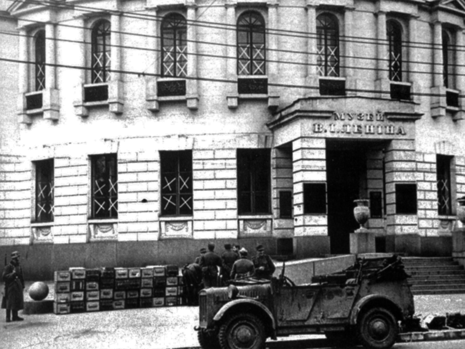 Розмінування німцями Музею Леніна у вересні 1941 року. Київ.